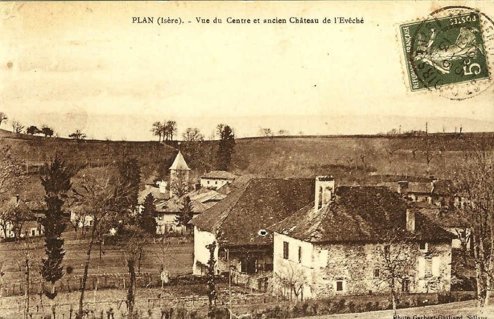 Plan, Isère, vue du centre et ancien château de l'evêché, carte postale ancienne.